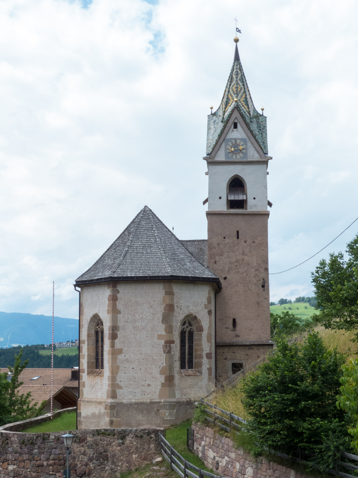 St.-Blasius-Kirche in Verschneid bei Mölten, zwischen Meran und Bozen, Südtirol, Italien